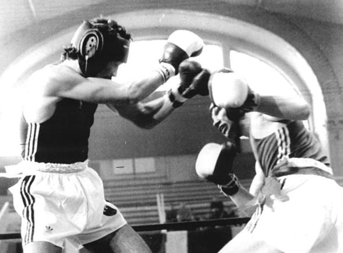 Alexander Künzler, Wolfram Schmidt ADN-ZB CAF-Tele-15.11.86 VRP: Feliks-Stamm-Boxturnier-Zum Auftakt dieses internationalen Turniers mit 100 Aktiven aus 14 Ländern kam der Schweriner Wolfram Schmidt (r.) im Weltergewicht zu einem 4:1 Punktsieg über Alexander Künzler (BRD). Information added by Wikimedia users.Abgebildete Personen: Alexander Künzler, Boxer Wolfram Schmid, Boxer